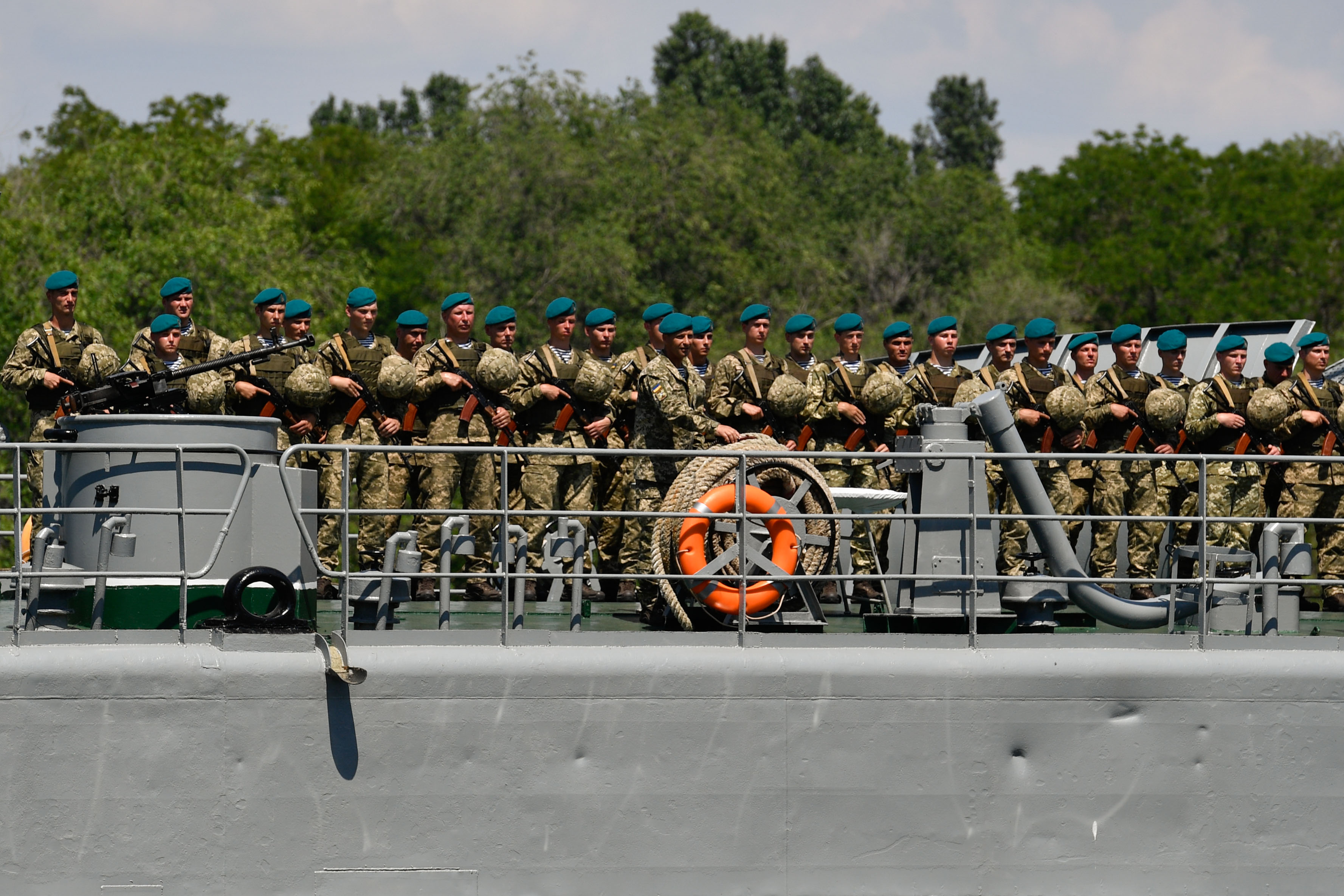 23 травня 2018 року Президент України на урочистій церемонії у Миколаєві вручив морським піхотинцям нові берети барви морської хвилі.